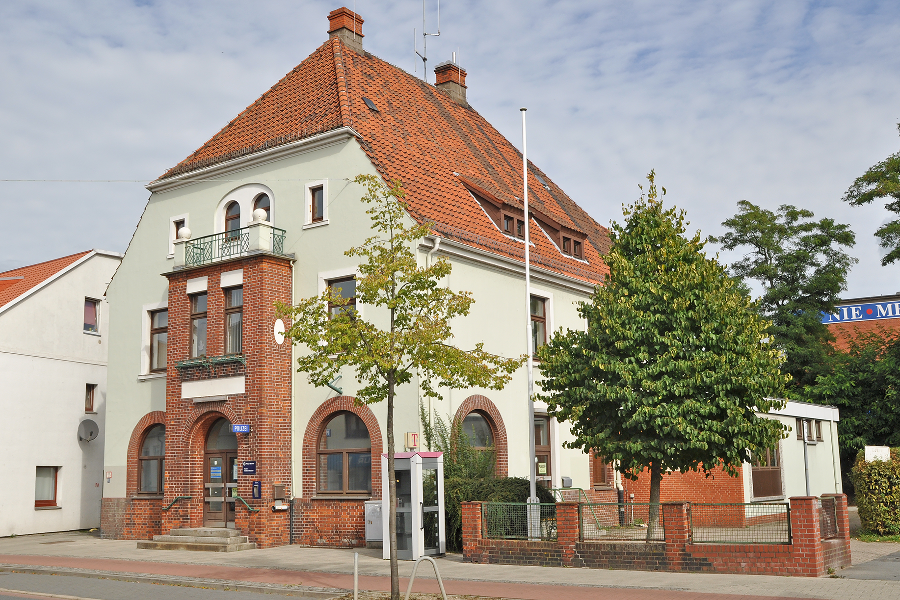 Polizeiwache XV, 11. Polizeirevier, Revier Woltmershausen in Bremen, Woltmershauser Straße 71Das abgebildete Objekt ist ein geschütztes Kulturdenkmal in der Freien Hansestadt Bremen, mit der Nr. 3420 beim Landesamt für Denkmalpflege registriert.